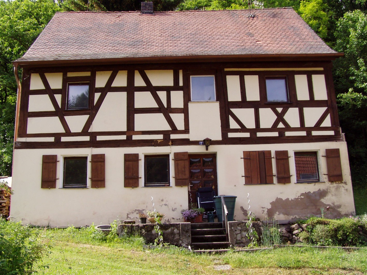 Hohenrad 2 WohnhausThis is a photograph of an architectural monument.